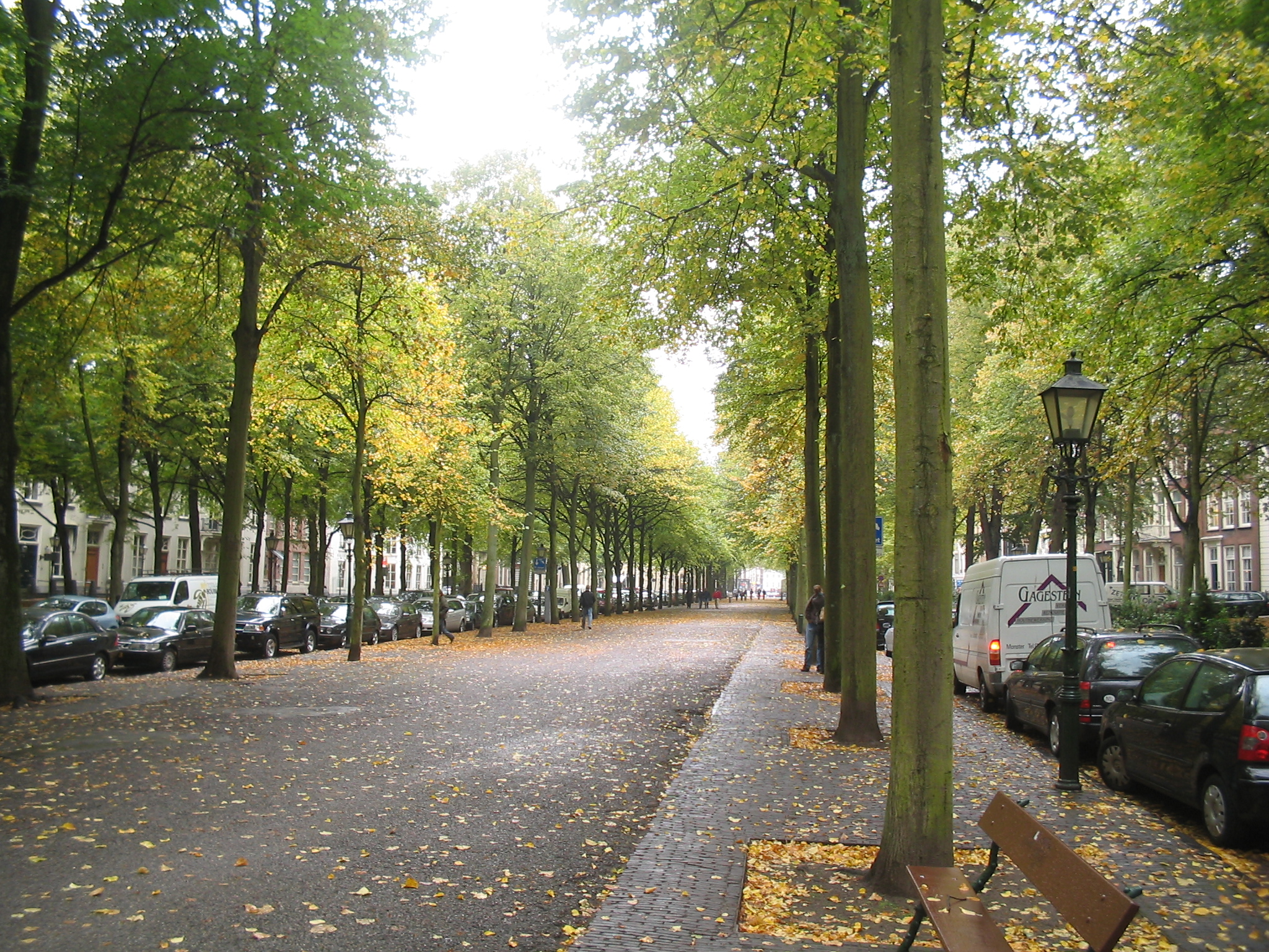 Lange Voorhout , Den Haag, Netherlands, 21 oktober 2005